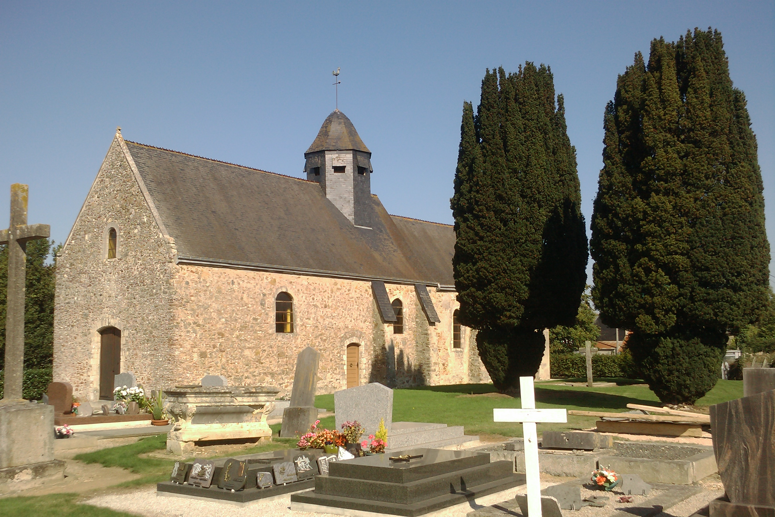 Le Mesnil-Angot, commune fusionnée à Graignes-Mesnil-Angot